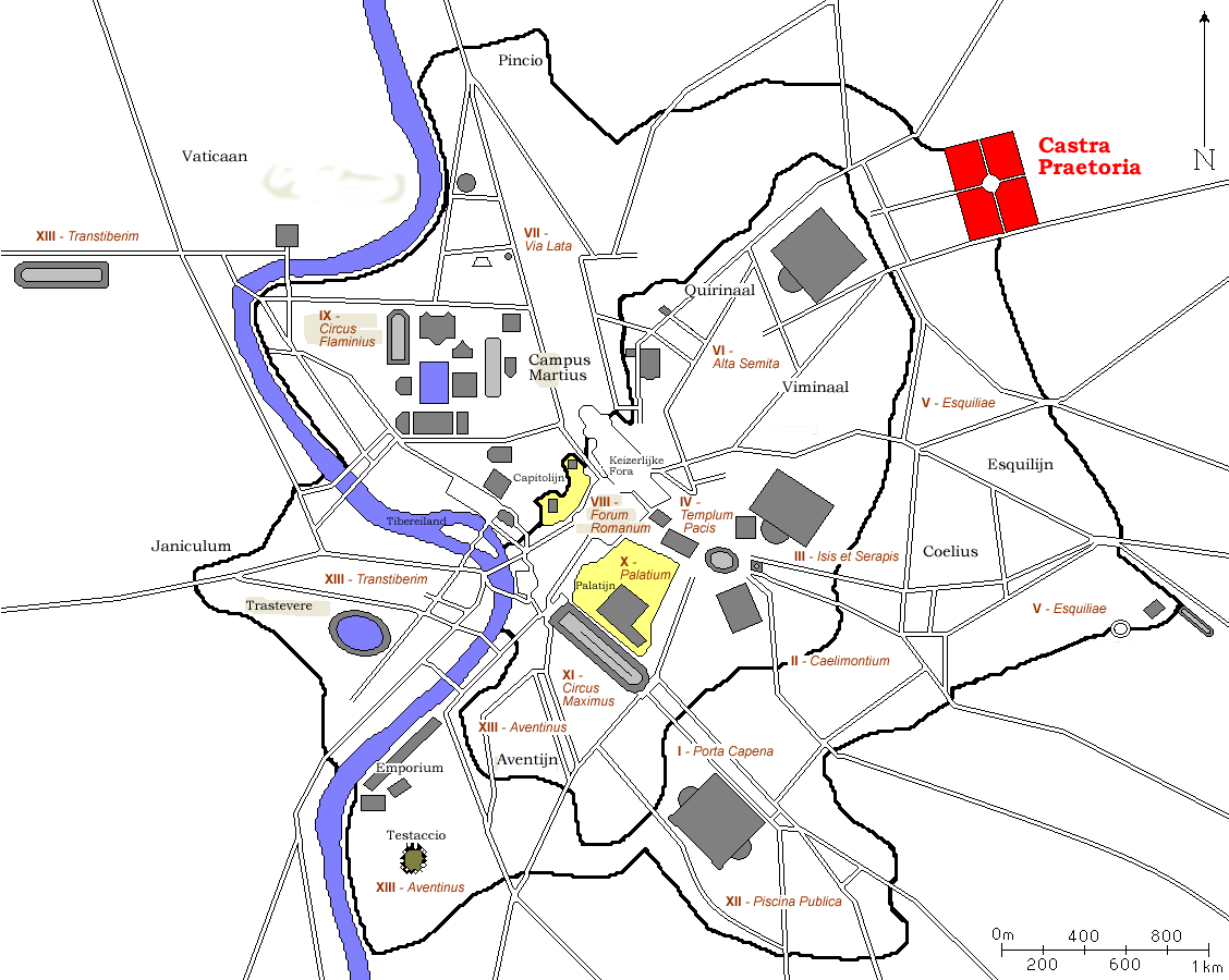 Kaart van antiek Rome waarop de Castra Praetoria is uitgelicht. Kaart is afkomstig van FR:wiki en door mij naar een Nederlandse versie bewerkt. Auteurs: nl::fr:User:ColdEel en Gebruiker:Joris1919